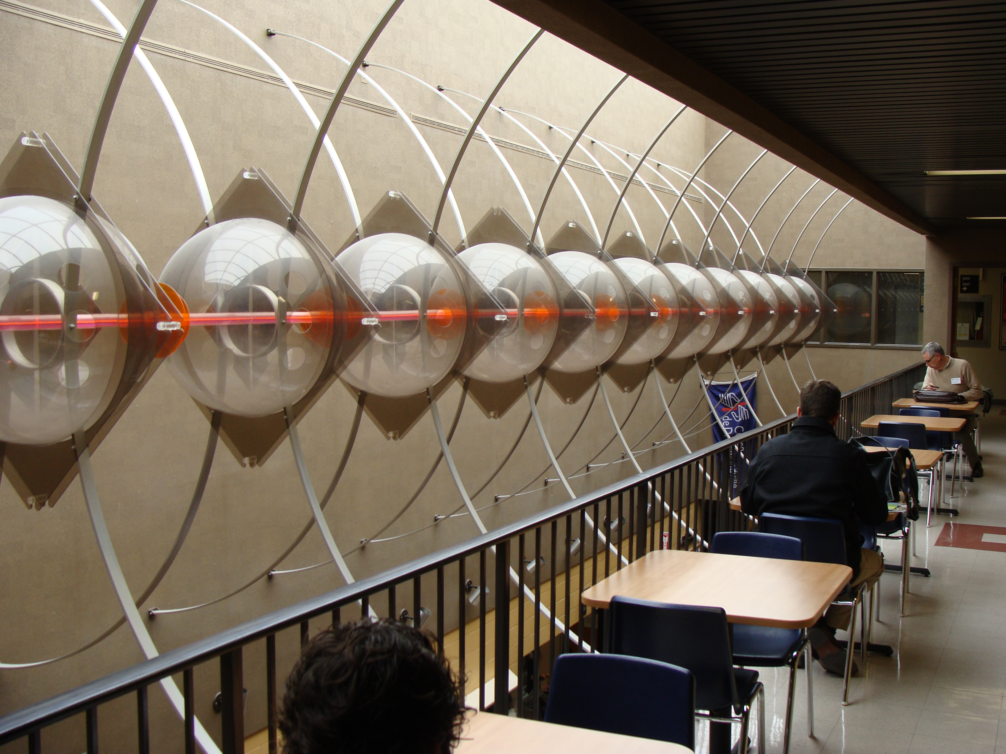 Cégep de Drummondville, au Québec.